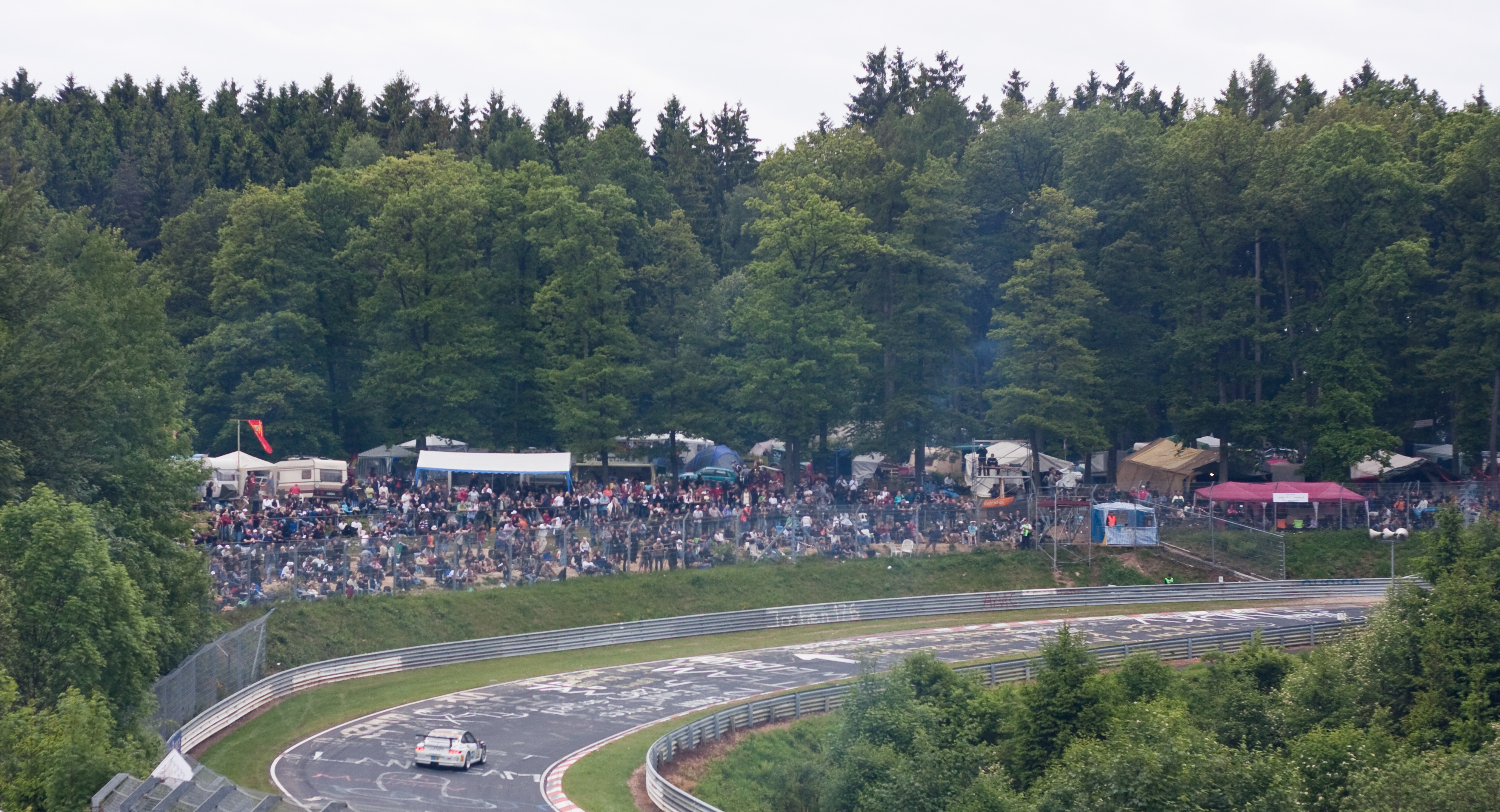 Zuschauerbereiche am Streckenabschnitt Brünnchen der Nordschleife